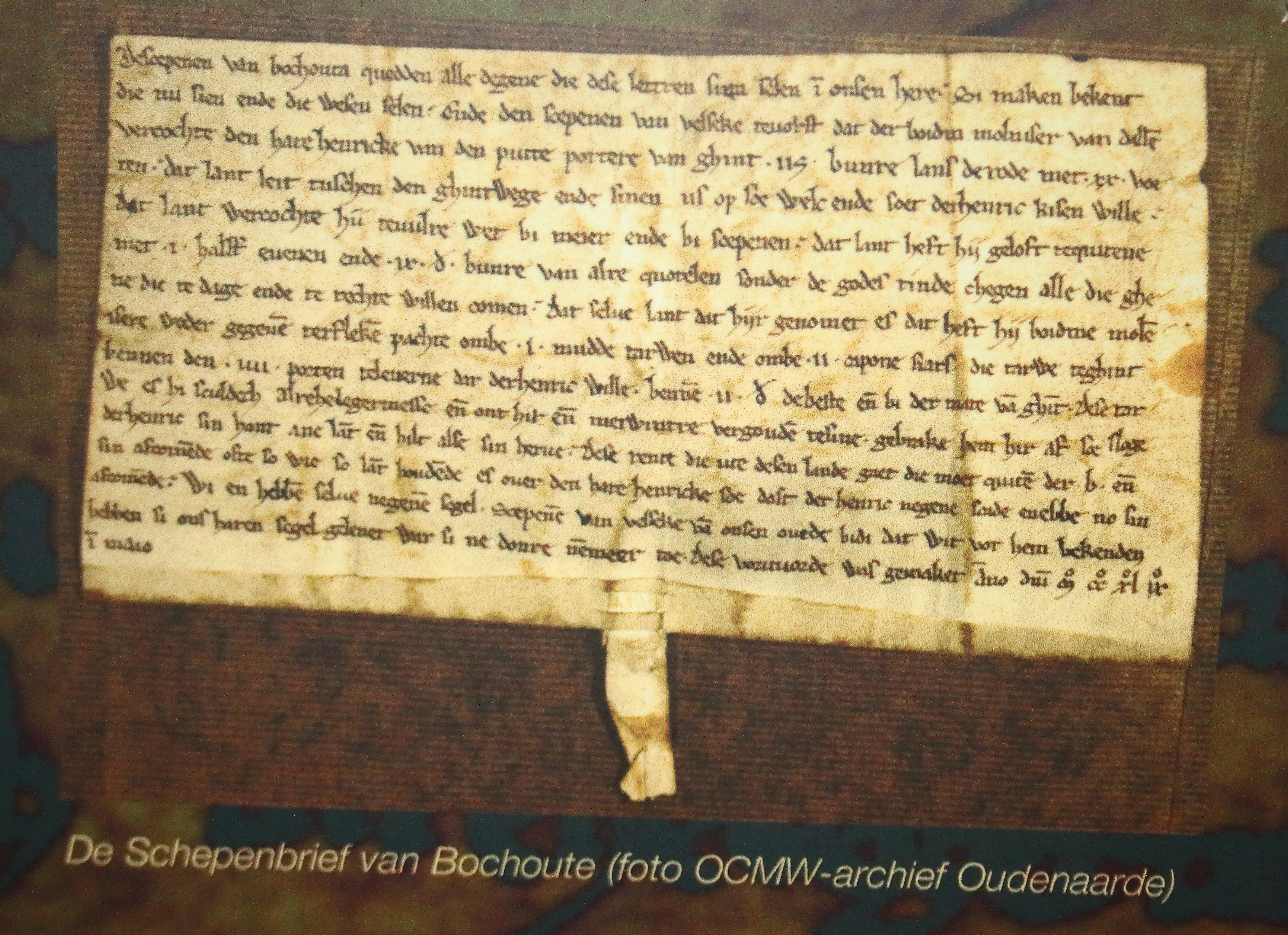 schepenbrief van Bochoute